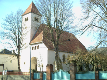 Temple protestant de Longeville-lès-Metz